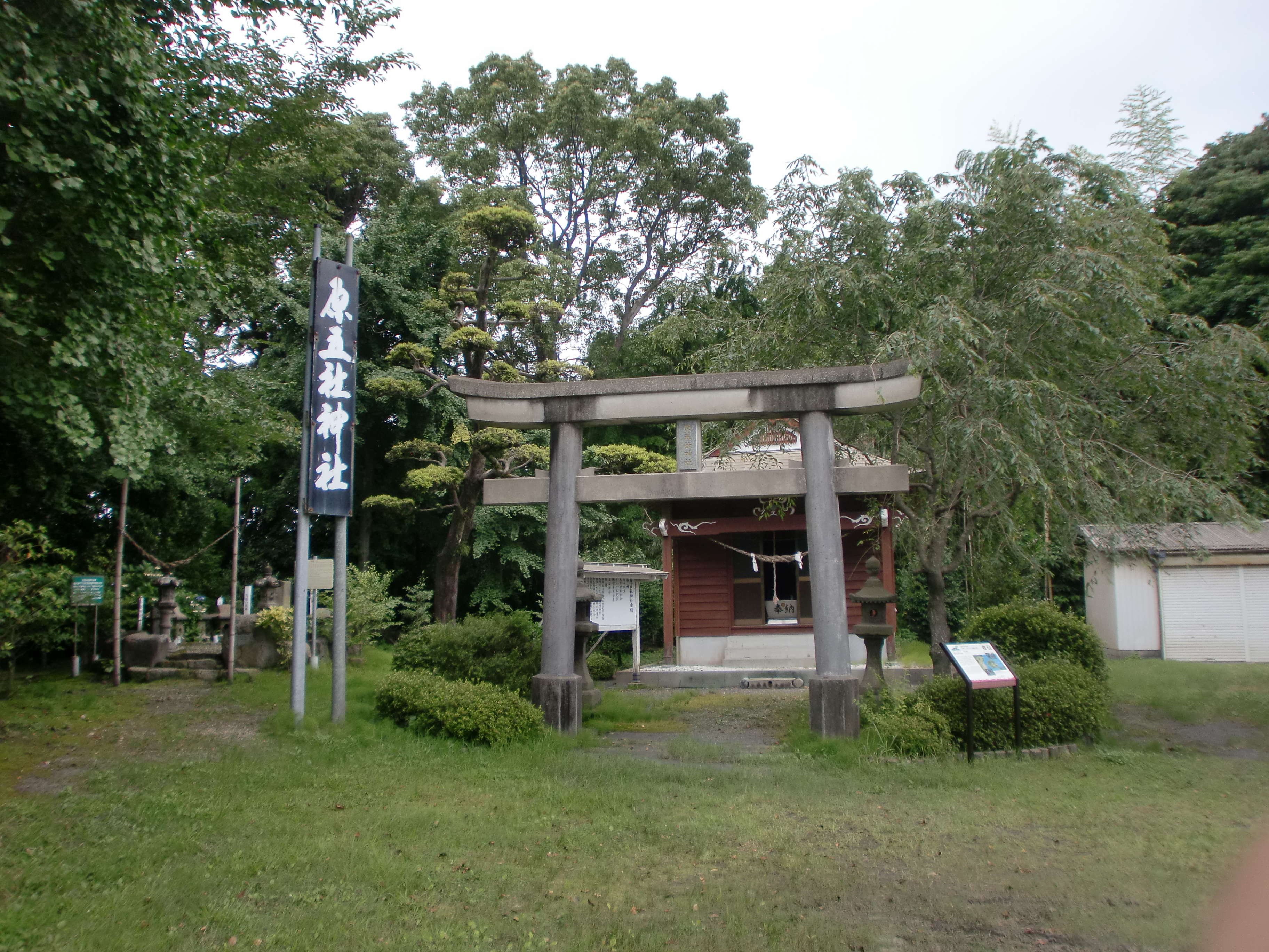 鹿児島市吉野町にある原五社神社。